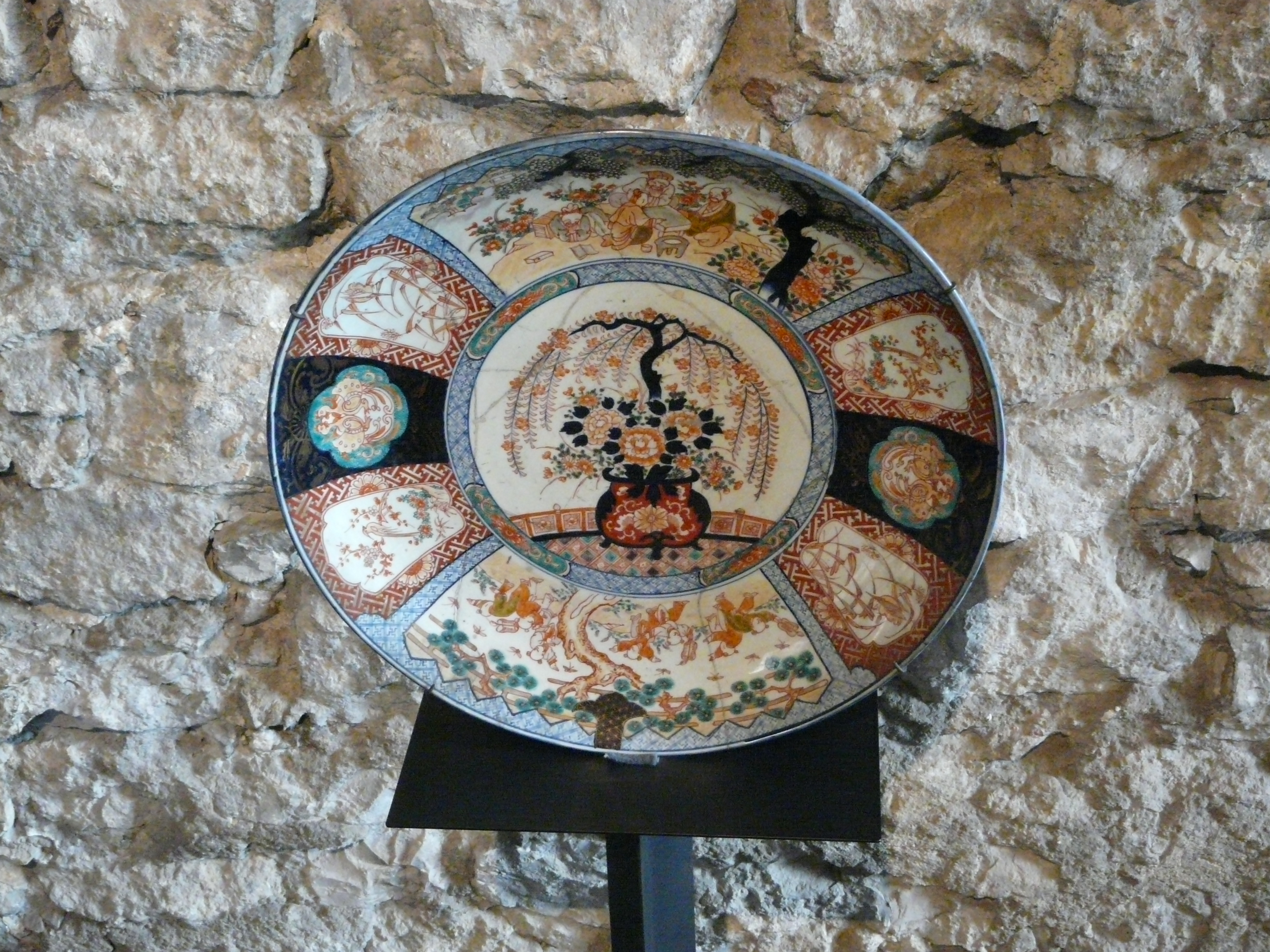 Kraków